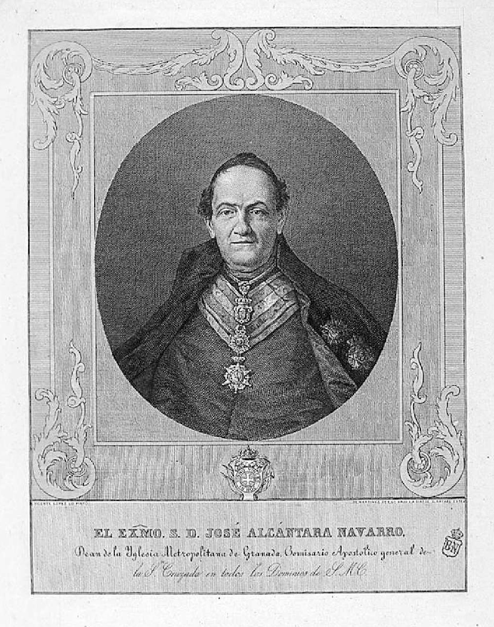 Retrato de José Alcántara Navarro. Grabado calcográfico de Domingo Martínez Aparici por pintura de Vicente López Portaña. Madrid, Biblioteca Nacional de España